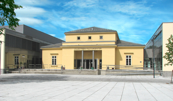 Lillestrøm Kultursenter